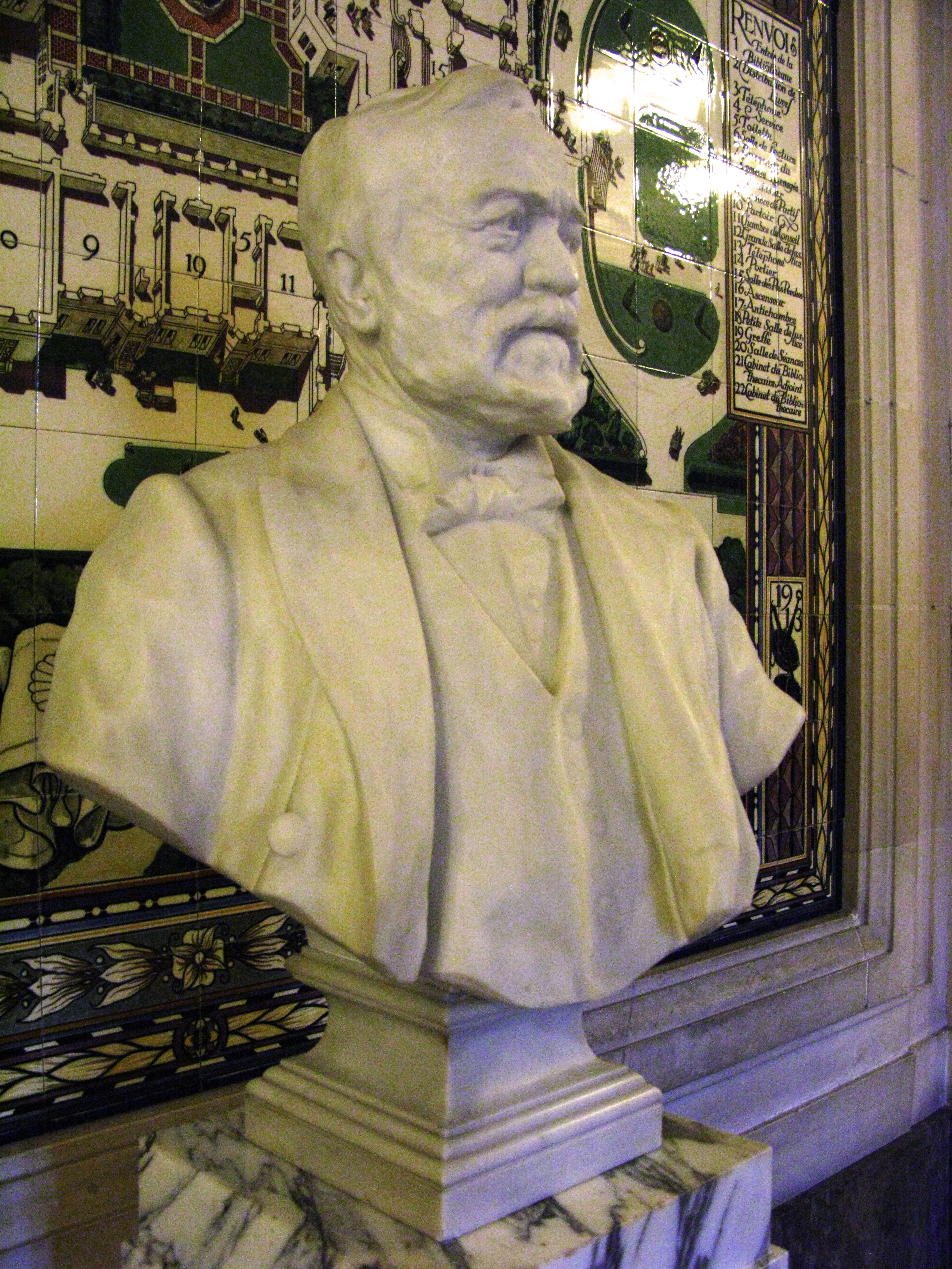 Buste d'Andrew Carnegie se trouvant dans le Palais de la Paix Peace Palace Den Haag The Hague La Haye